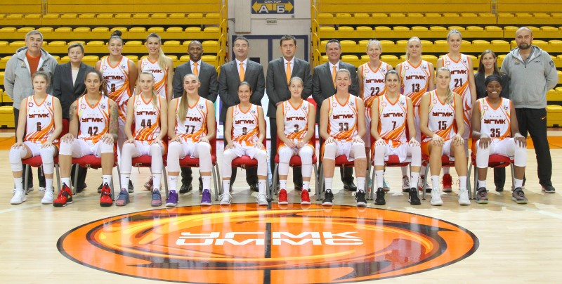 Команда сезона 2018/2019